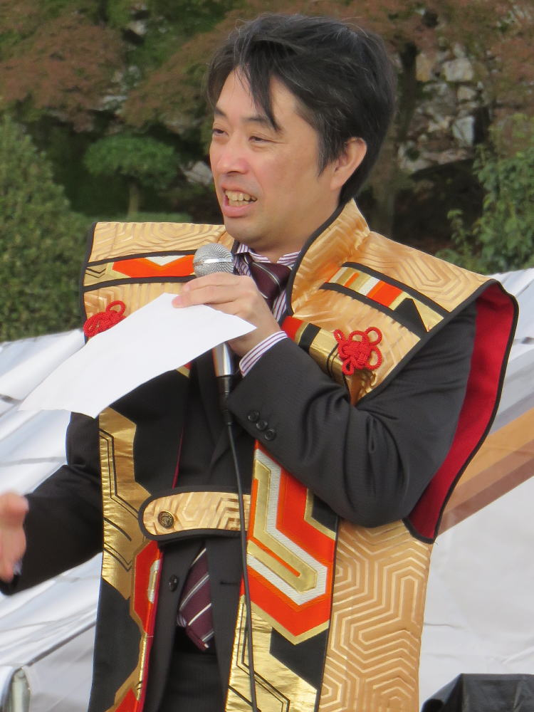 将棋棋士の久保利明（平成２８年１１月、姫路市で行われた人間将棋にて）